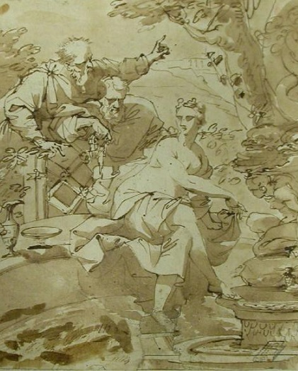 Susanna e i vecchioni, inchiostro e acquerello su cartoncino, 17 x 20.5 cm., Museo Poldi Pezzoli, Milano